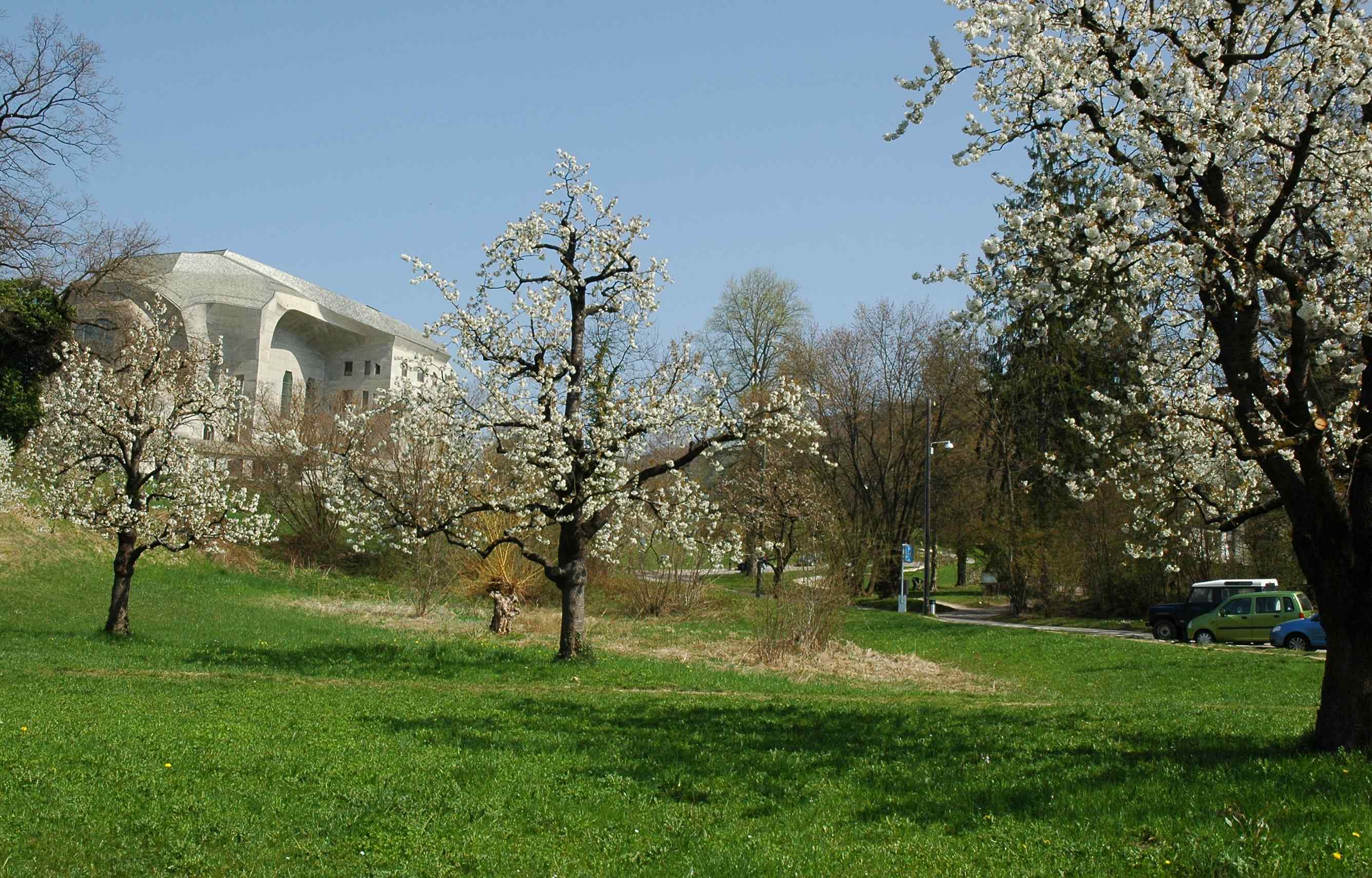 Goetheanum ligger oppe på høyden helt inntil grensen til Arlesheim.